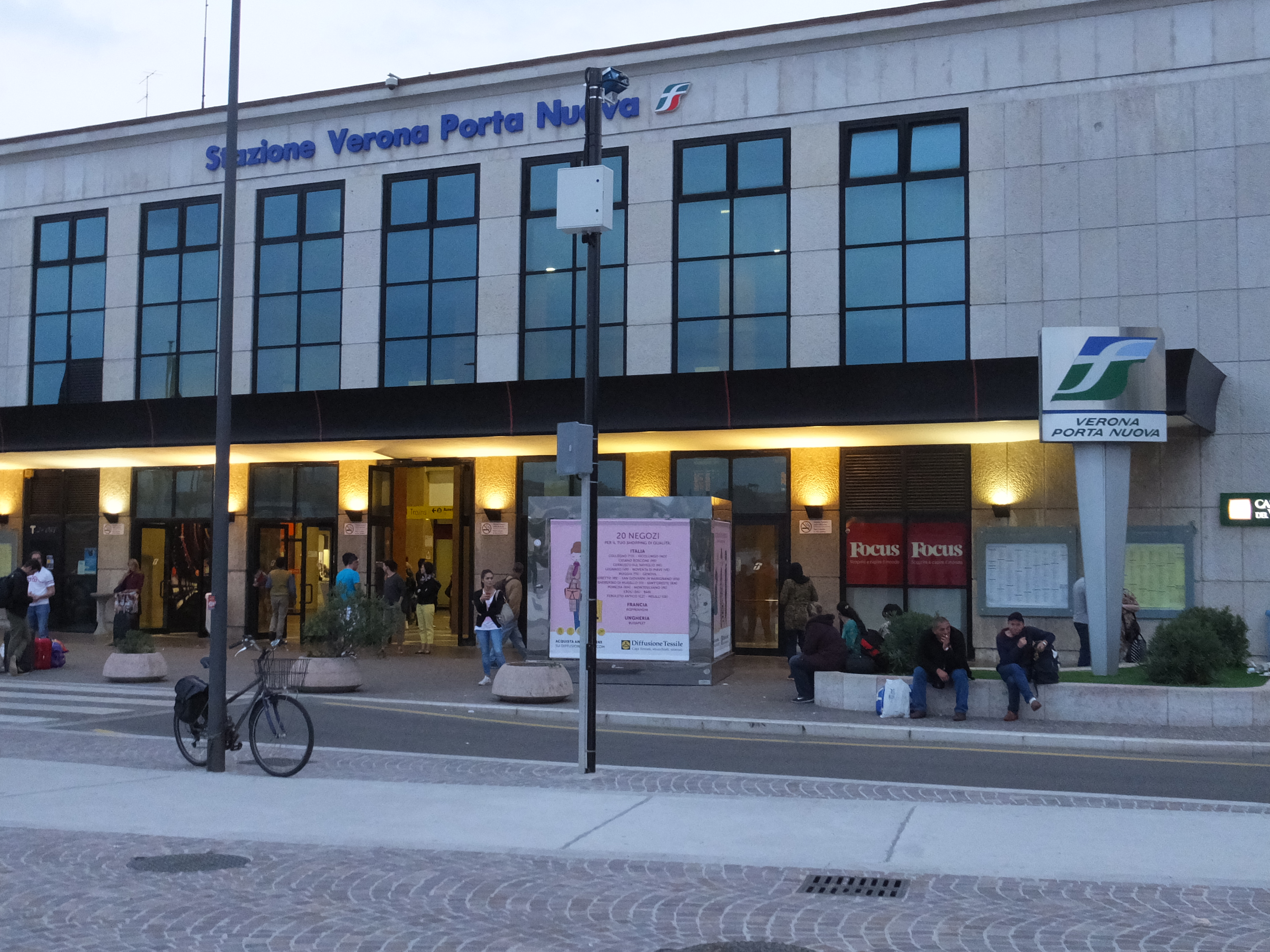 Stazione Verona Porta Nuova 維羅納新站